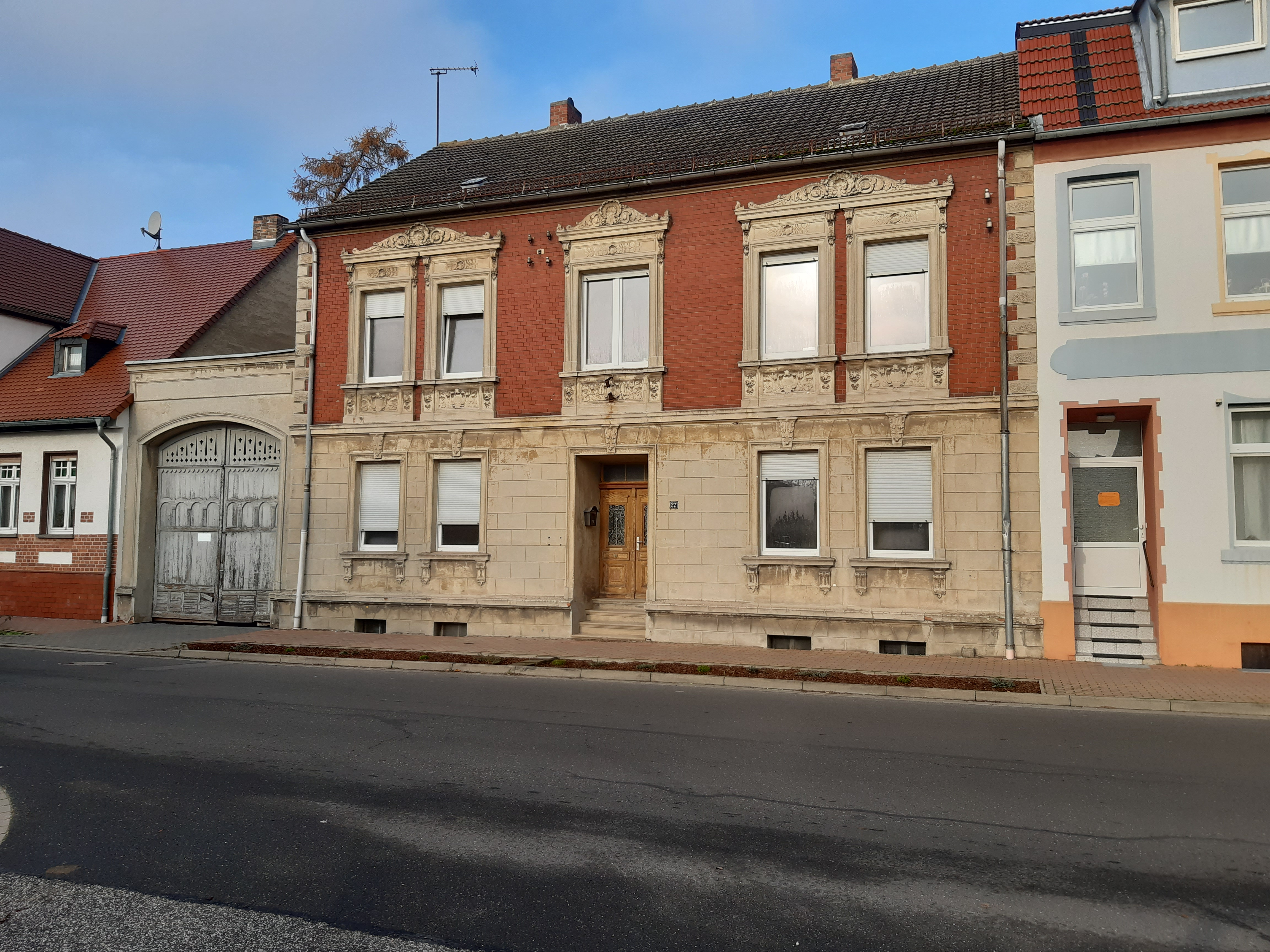 Wohnhaus